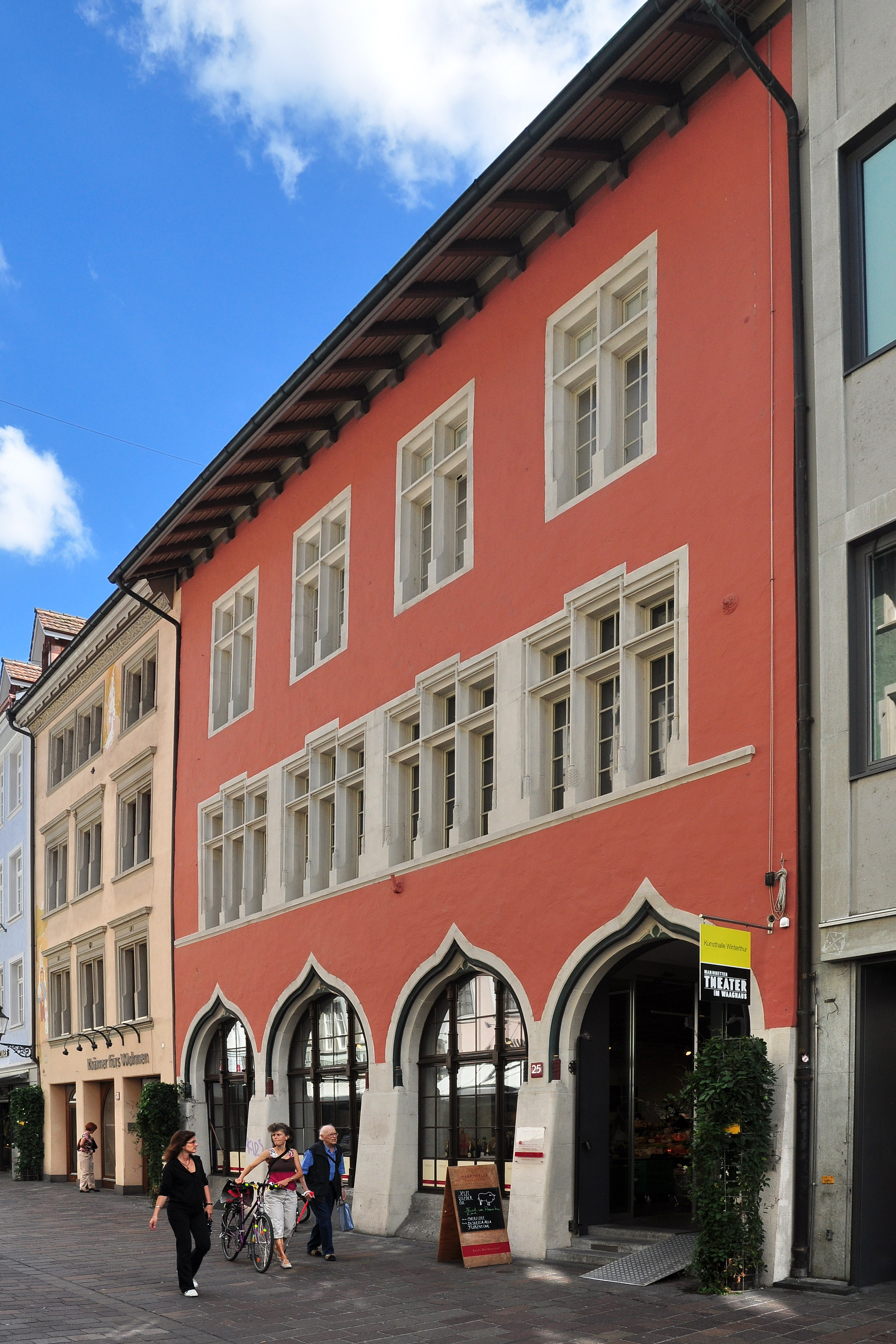 Ehemaliges Waaghaus, Marktgasse 25 in Winterthur (Switzerland)